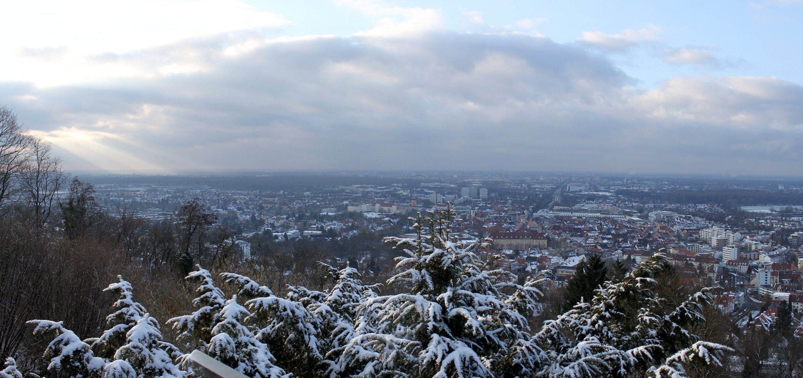 Blick vom Turmberg in Richtung Karlsruhe